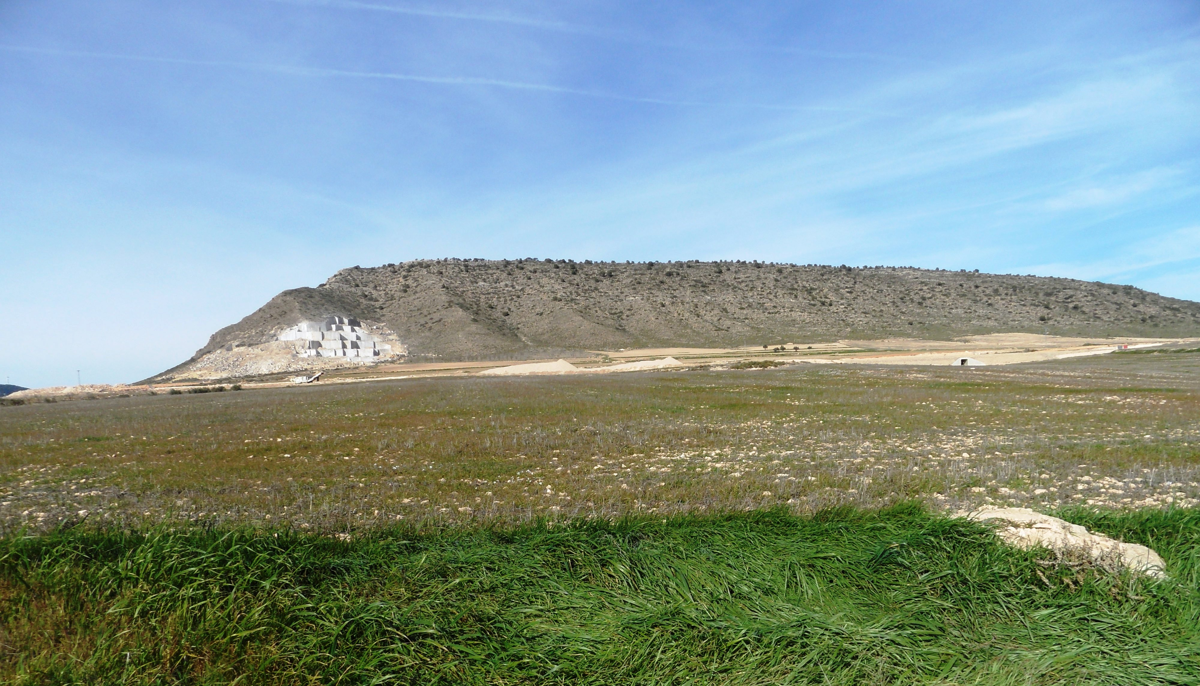 El Peñón del Rocín visto desde el Camino de la Reina (La Encina).